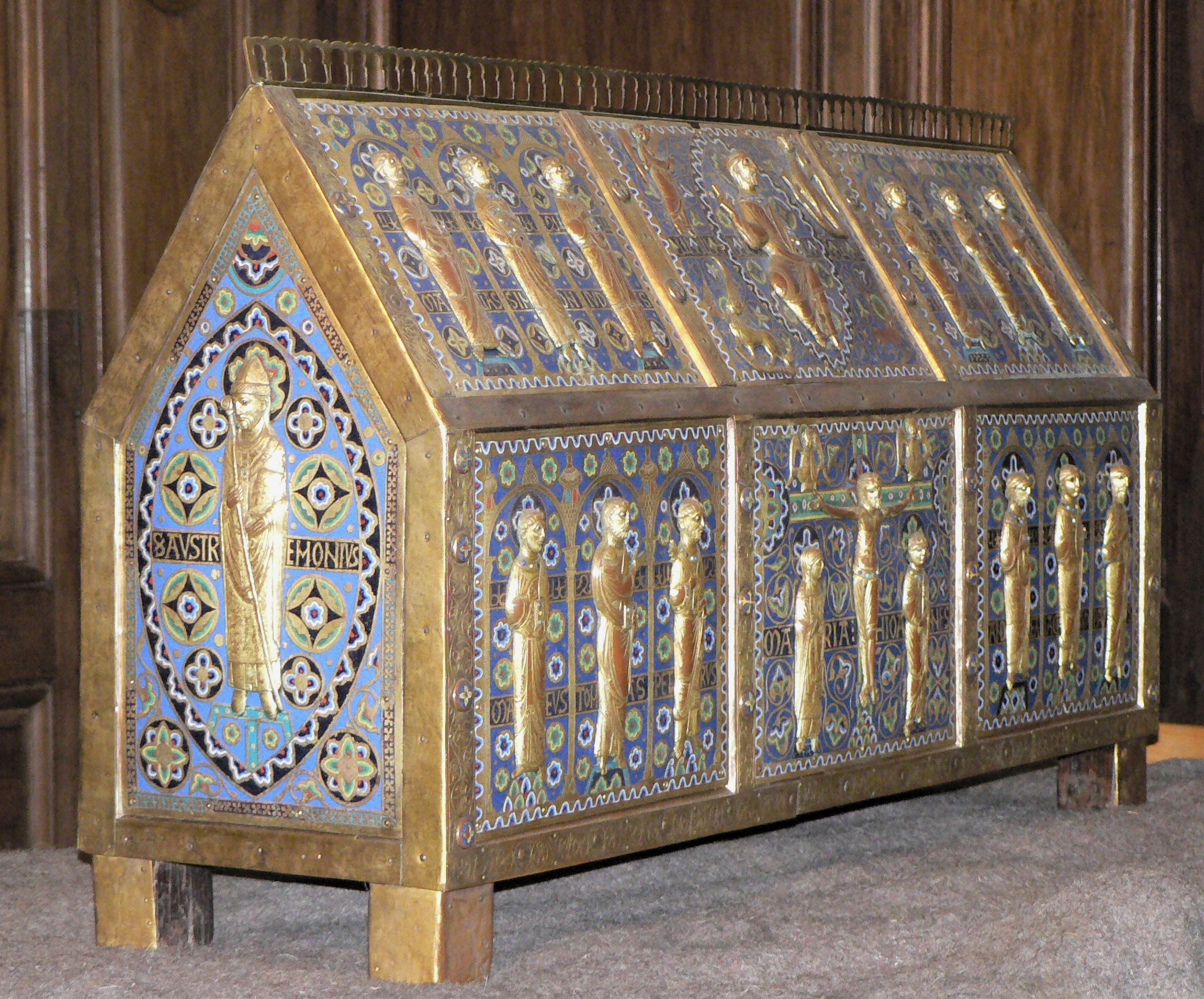 Châsse de saint Calmin en émaux de Limoges (XIIe siècle), conservée en l'abbatiale Saint-Pierre de Mozac.